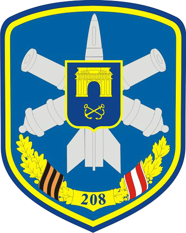 Емблема 208-ї Херсонської зенітно-ракетної бригади